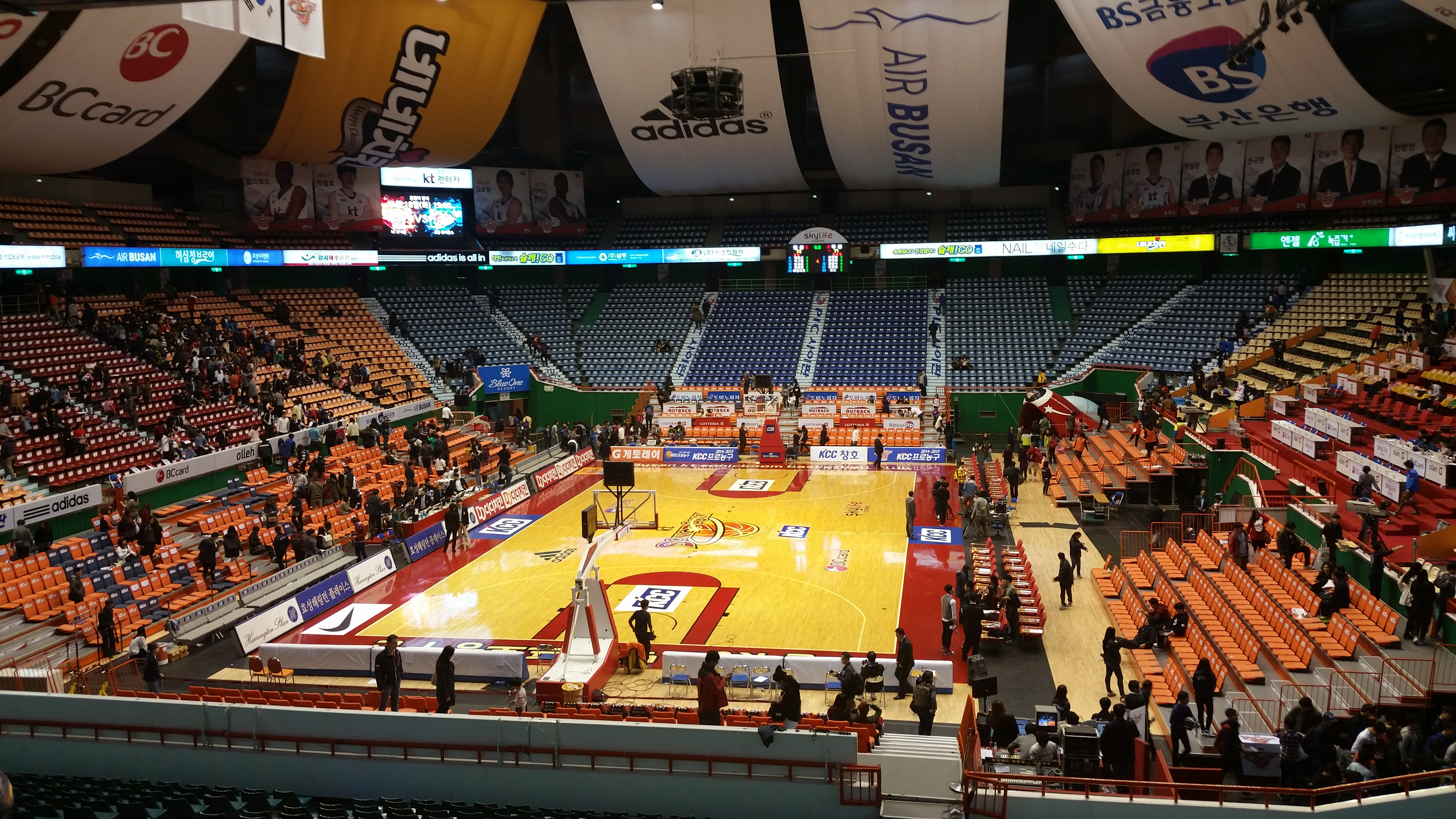 부산 KT 소닉붐 대 울산 모비스 피버스, 사직실내체육관